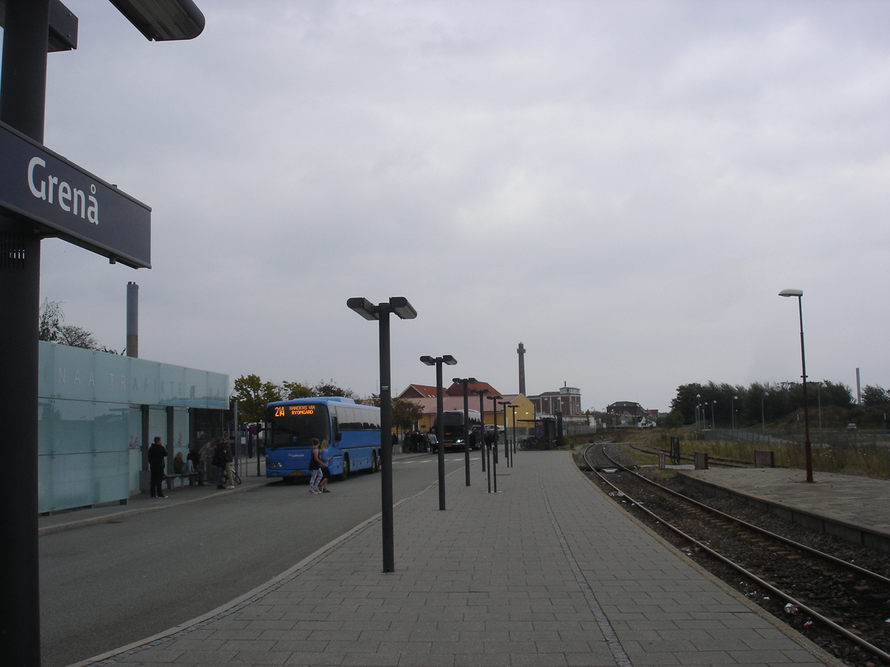 Fra Grenaa Station kan starten af Grenaa Havnebane skimtes for enden af omløbssporet